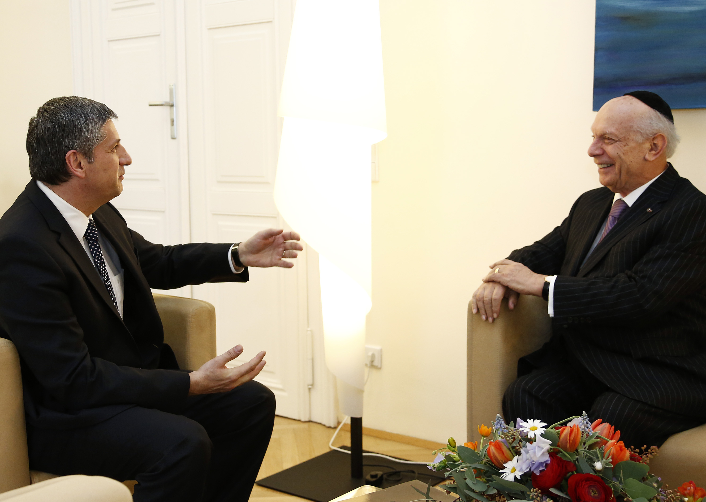 Vizekanzler Michael Spindelegger empfängt Rabbi Arthur Schneier zu einem Gespräch. Wien, 25.02.2013, Foto: Dragan Tatic